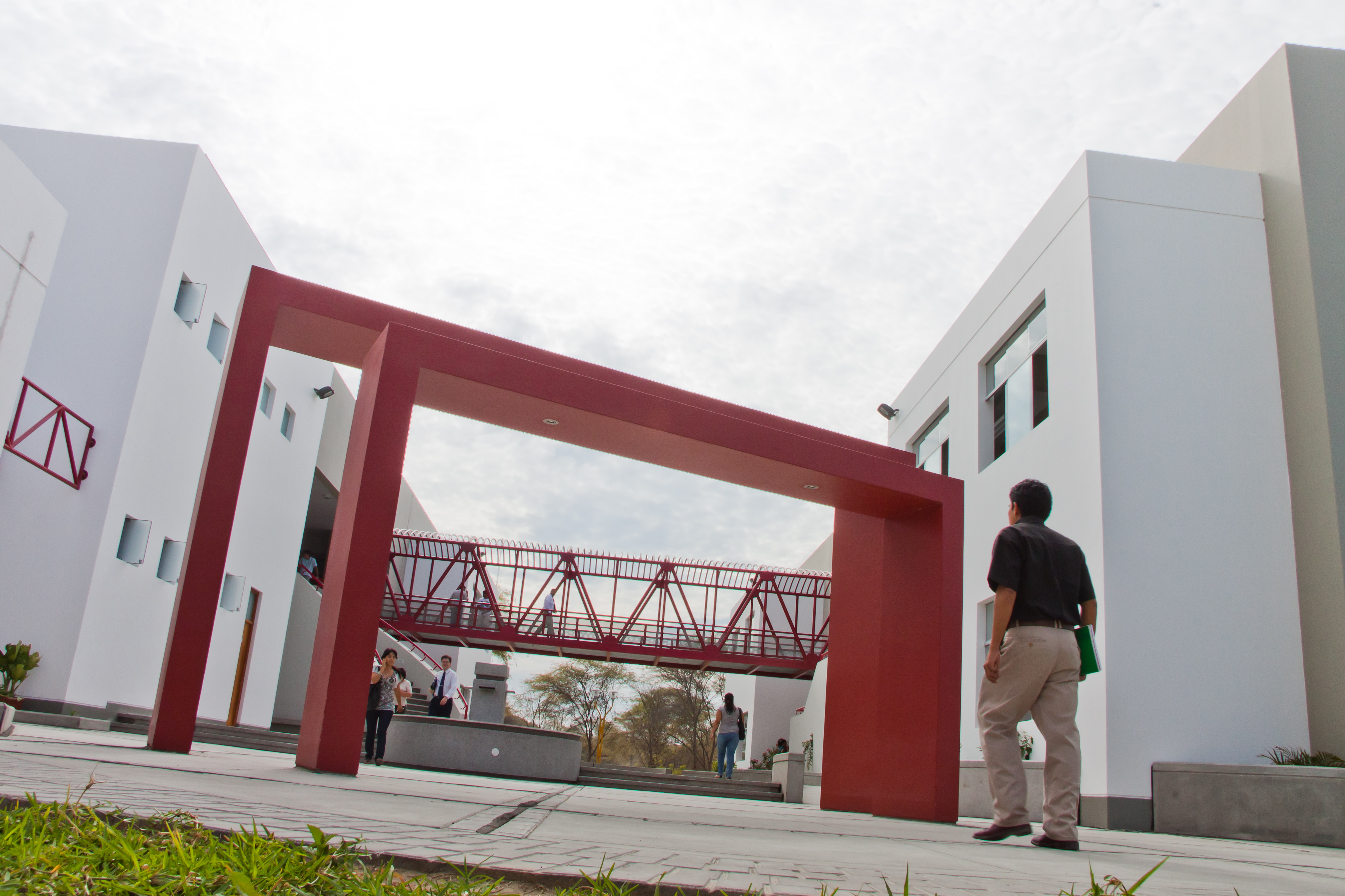 Edificio de la Facultad de Derecho de la Universidad de Piura - UDEP